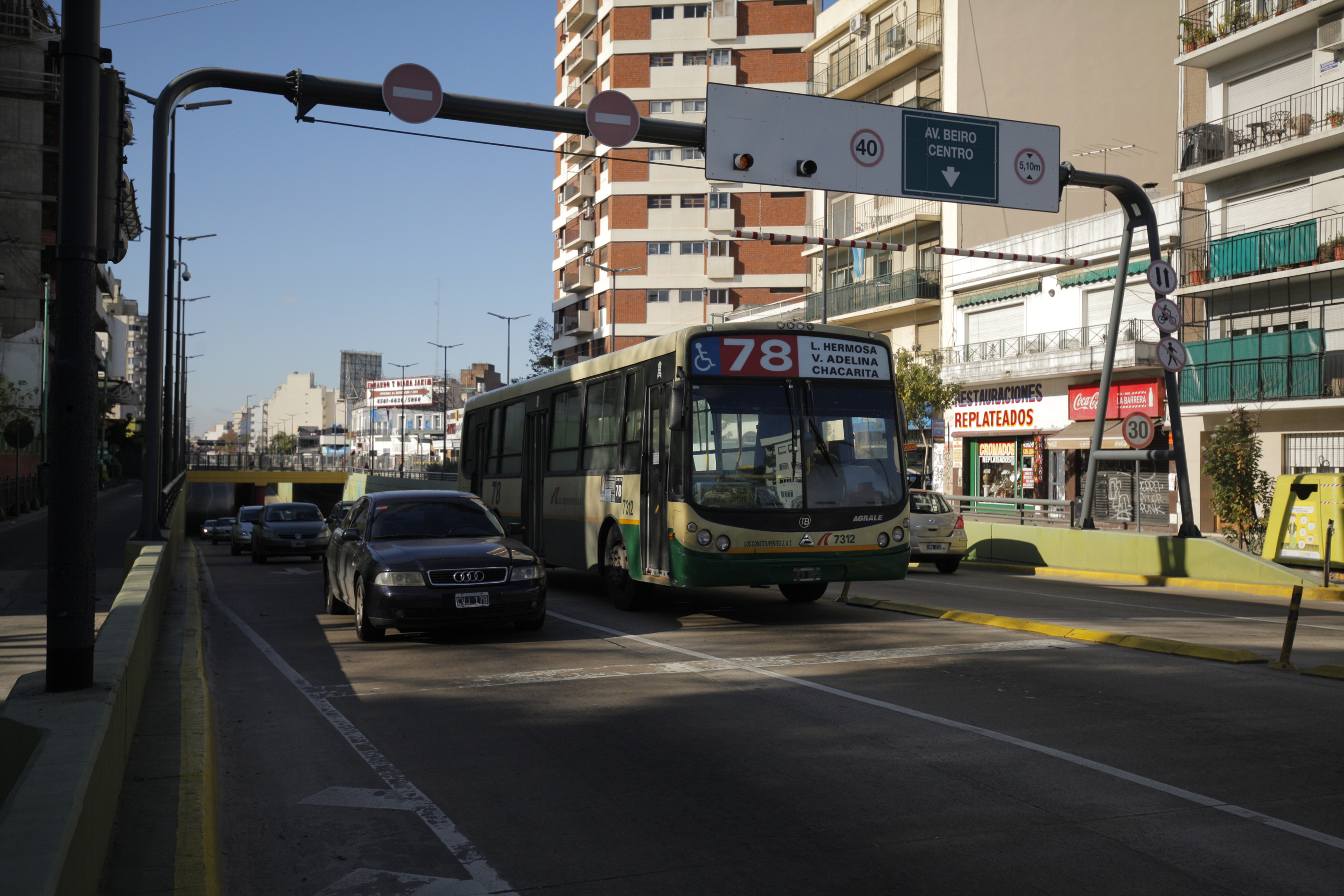 PBN San Martín terminado